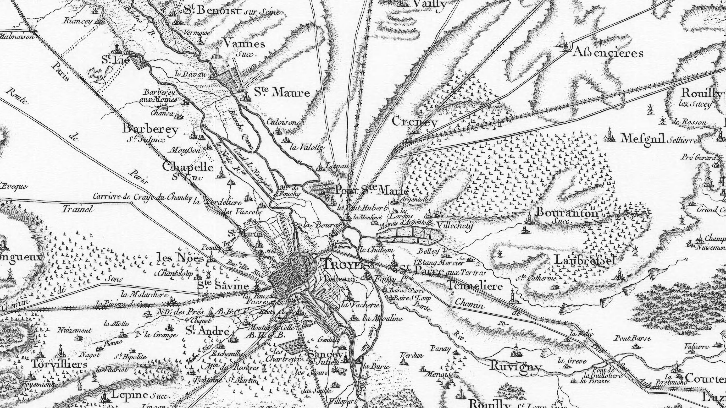 Carte de la région de Troyes par Jean-Dominique Cassini